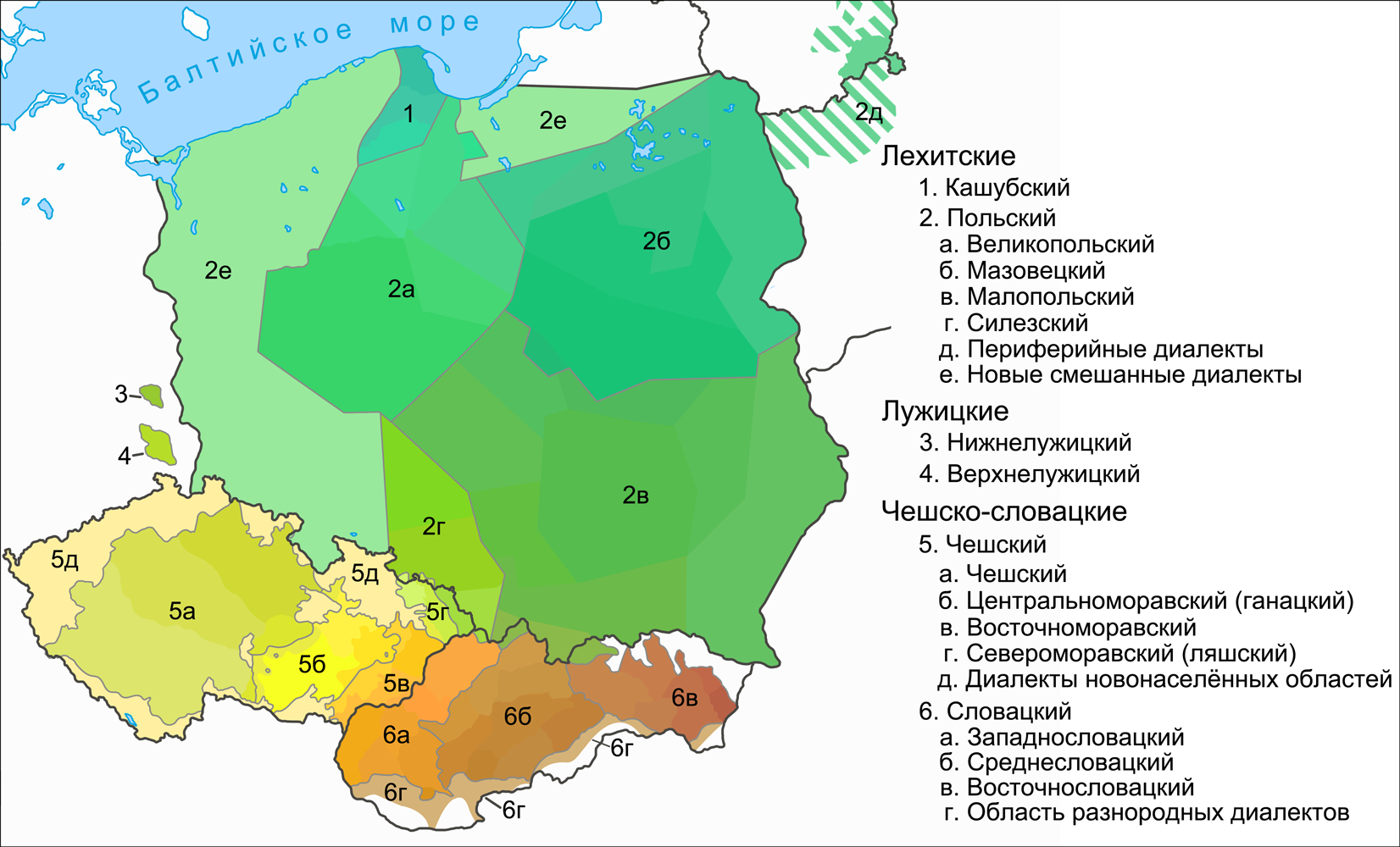 Карта западнославянских языков и диалектов. Источники: Gwary polskie. Przewodnik multimedialny pod redakcją Haliny Karaś. Mapa dialektów Dialekty i gwary polskie. Kompendium internetowe pod redakcją Haliny Karaś. Kaszubszczyzna. Zasięg terytorialny i podziały. Zasięg i zróżnicowanie kaszubszczyzny języka (mowy) Kaszubów. Grupy lokalne Linguistic Discovery of Dartmouth College. Idiosyncratic Factors in Language Endangerment: The Case of Upper Sorbian Slovake.eu. Úvod. O jazyku. Nárečia Bělič J. Nástin české dialektologie. Praha, 1972